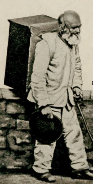 Šebestián Kubínek